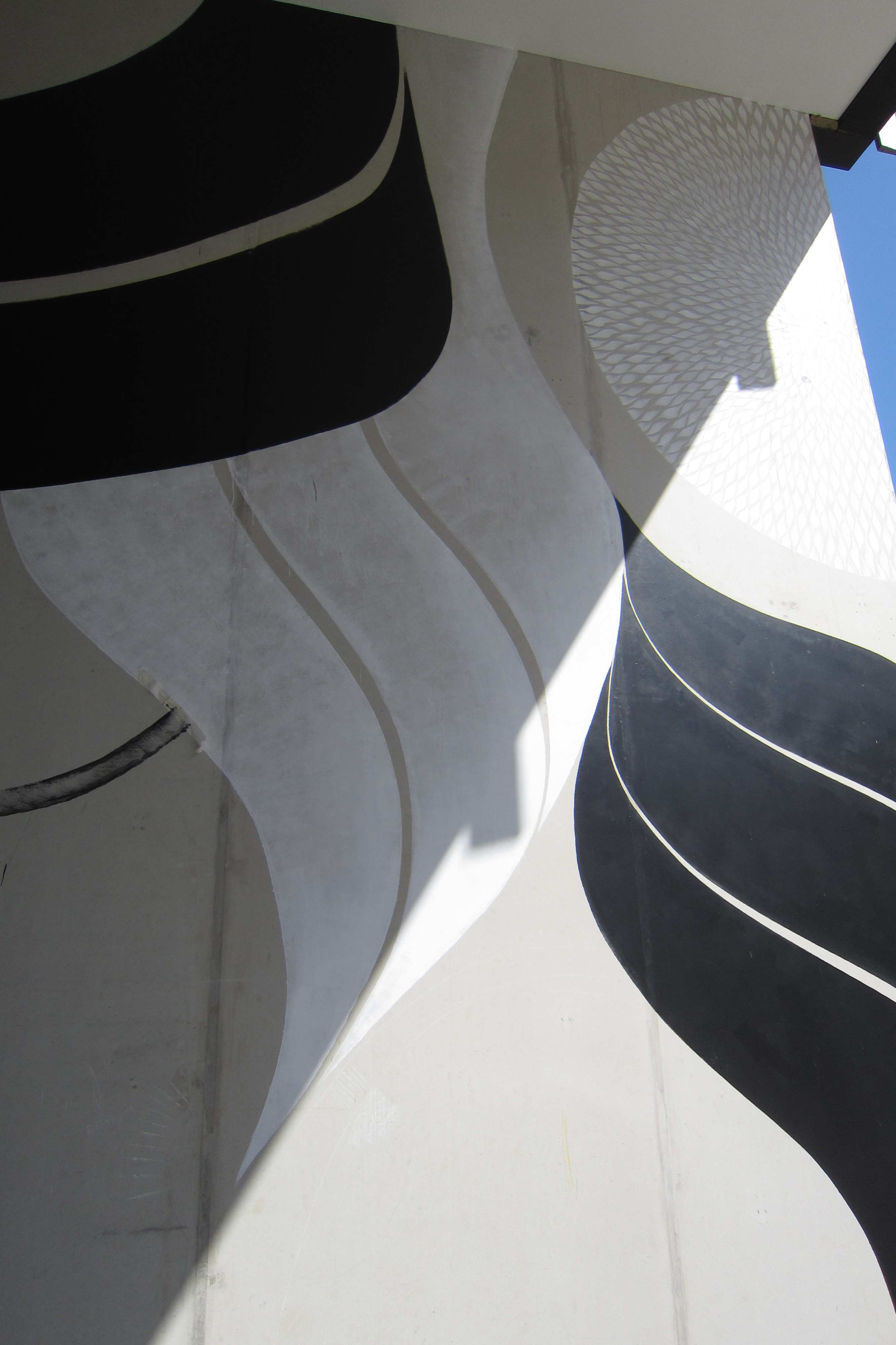 Muurschildering van Lucy McLauchlan aan het Stadskantoor, Hasselt, België